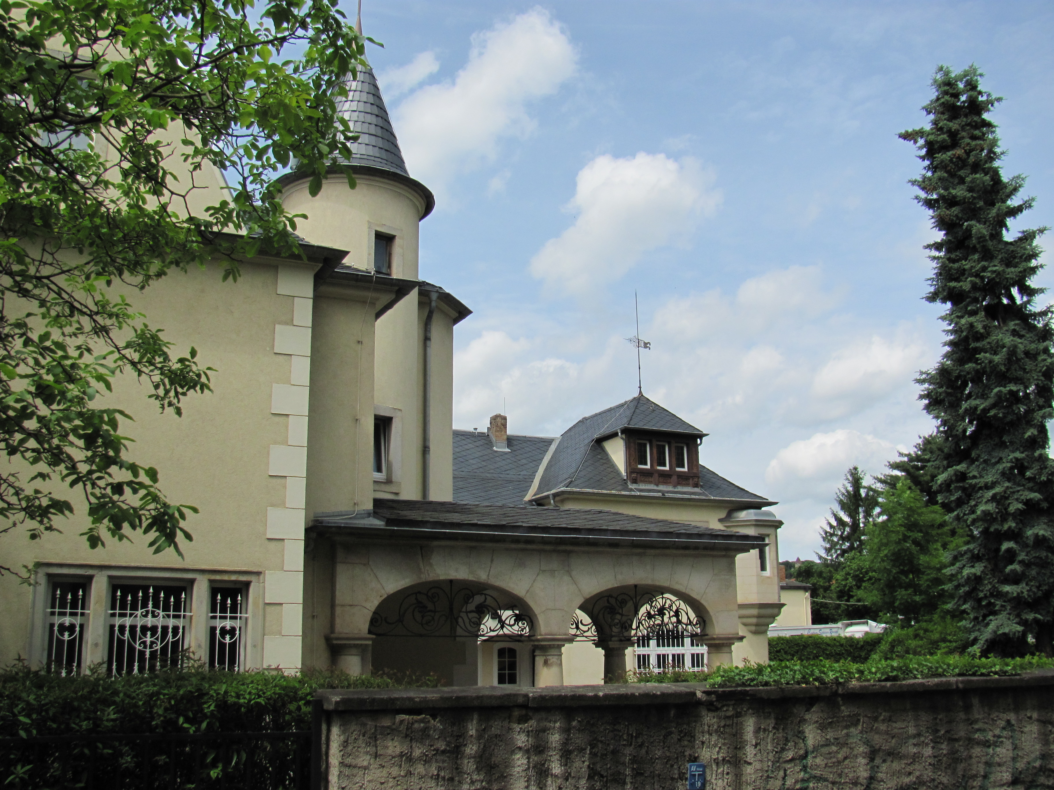 Radebeul Villa Meißner Straße 244